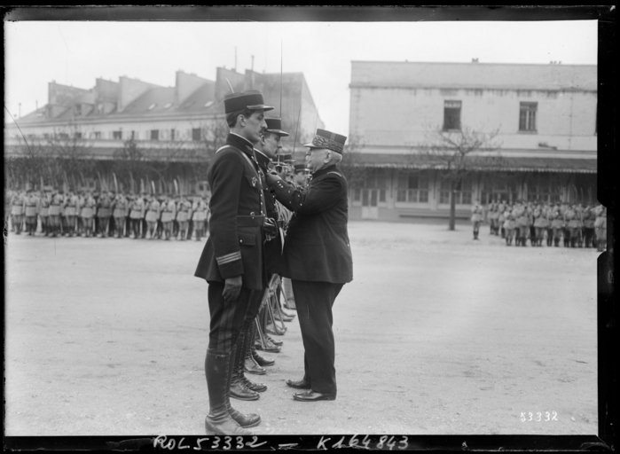 16/4/19, le maréchal Joffre passe en revue les élèves de [l'Ecole] polytechnique et leur remet des décorations gagnées au front